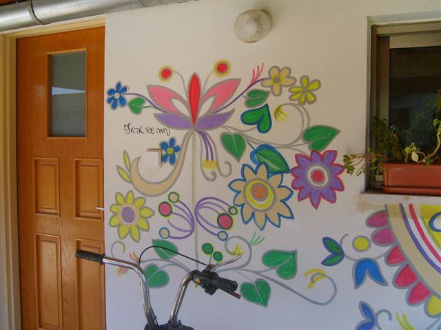 ציור קיר של המאיירת מיכל אפרת